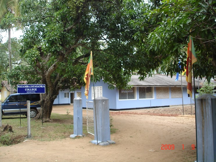 සිංහල: ජයසංක විද්‍යාලය